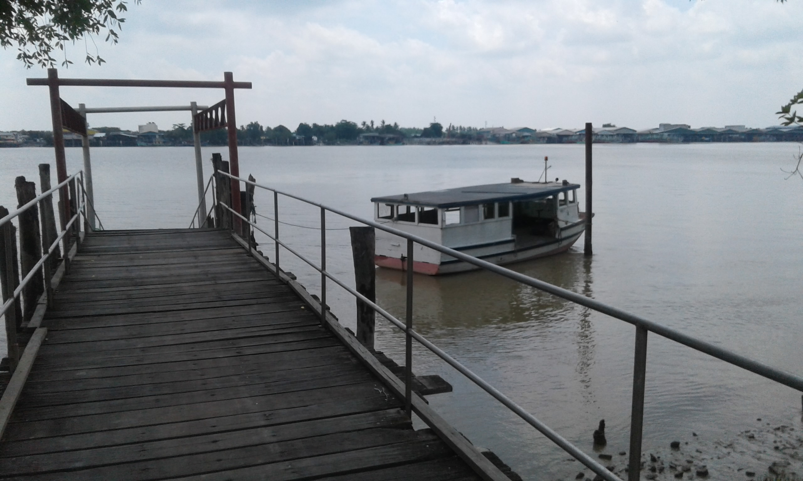 Terletak Di Ladang Sg Bernam